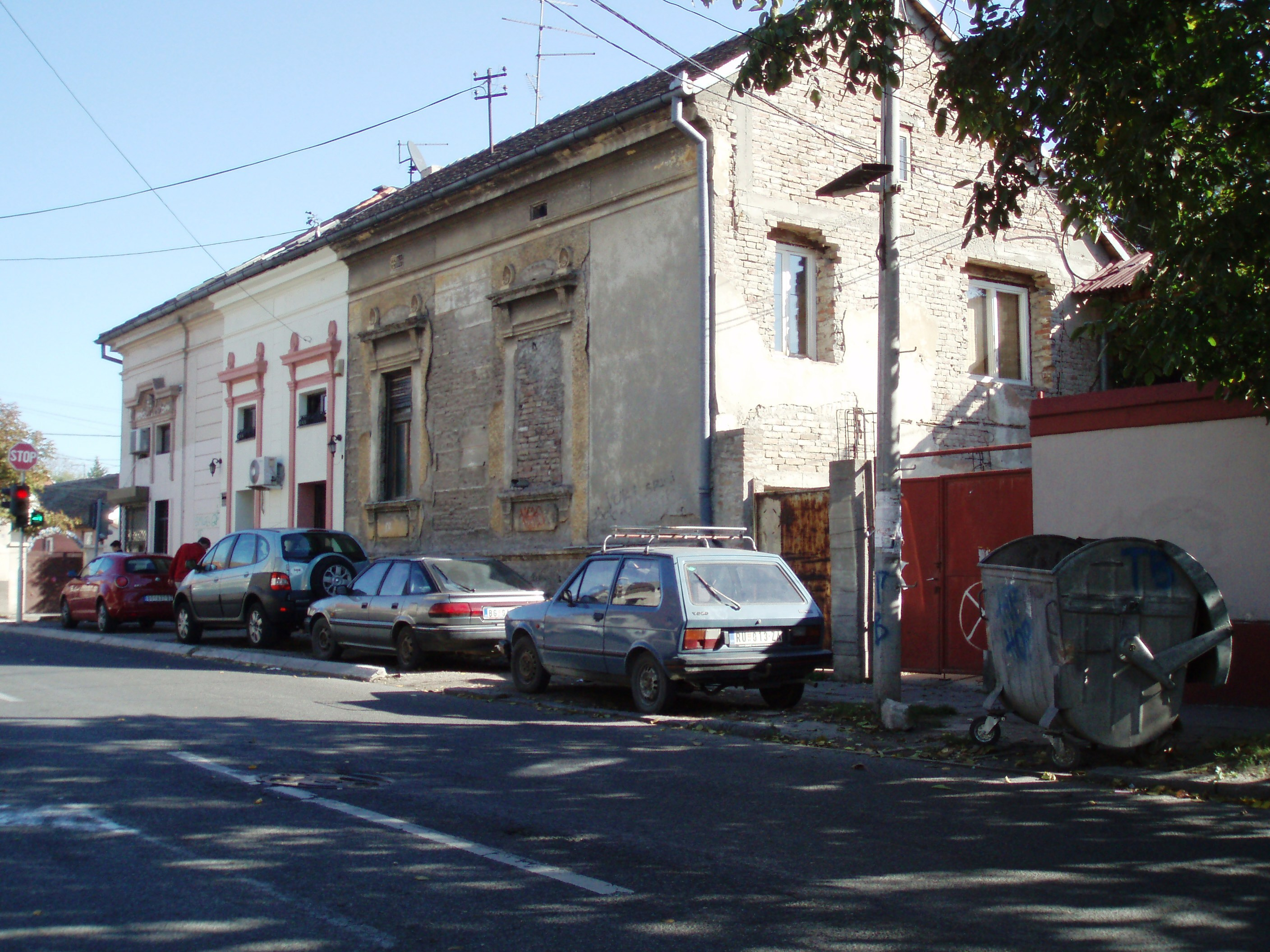 Kuća Dr. Save Nedeljkovića Zemunskog lekara, autor fotografije: Nicolo